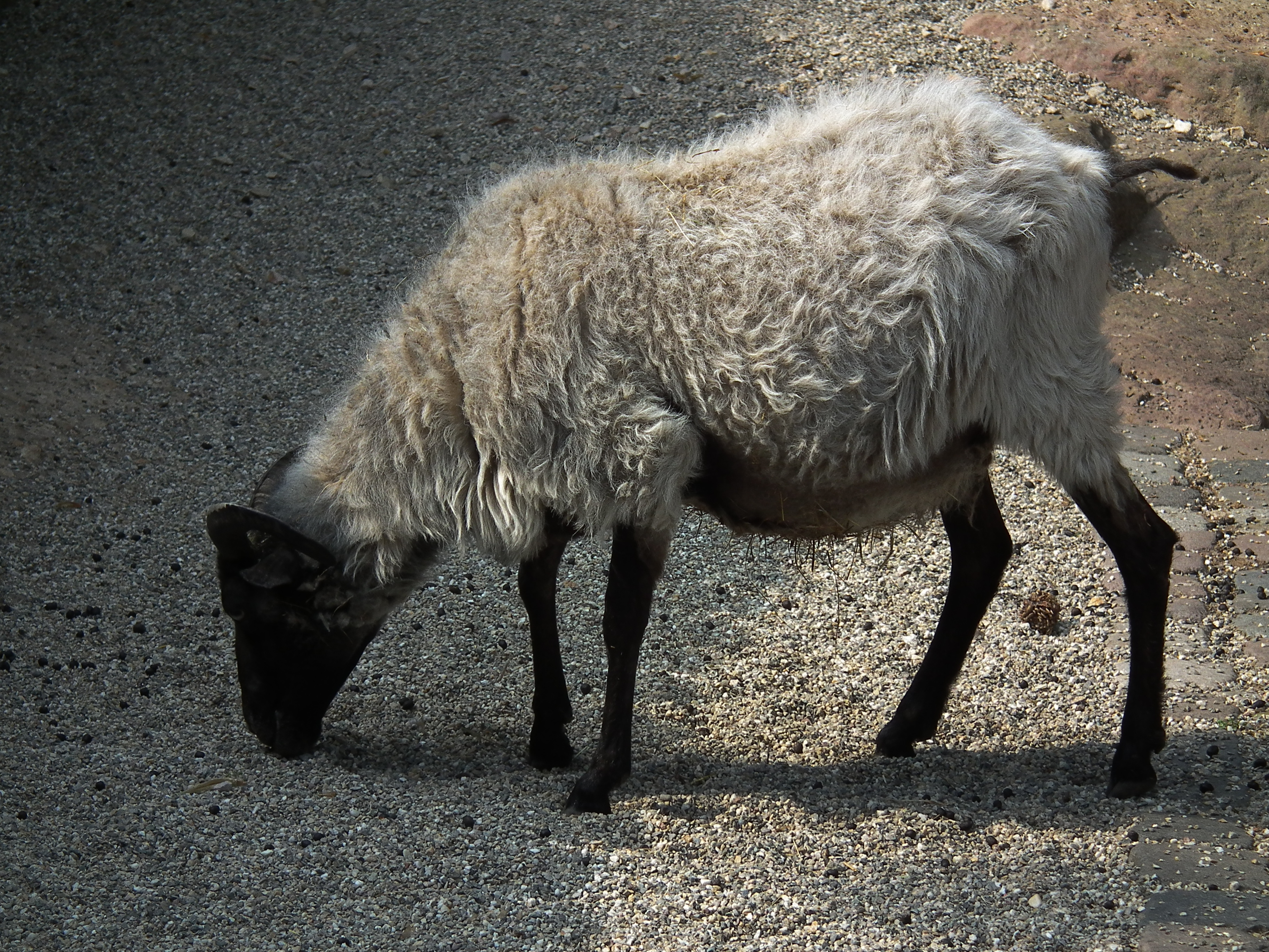 Graue gehörnte Heidschnucke, fotografiert im Herzogenriedpark Mannheim (Baden-Württemberg, Deutschland)